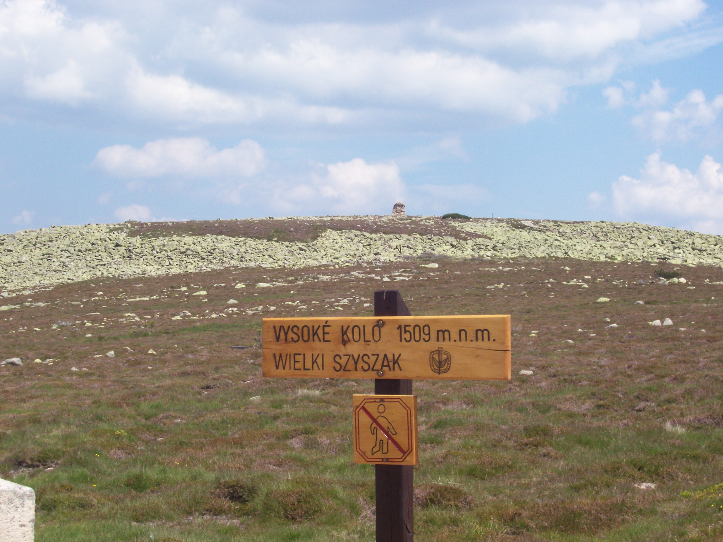 Wielki Szyszak (Karkonosze, Polska)